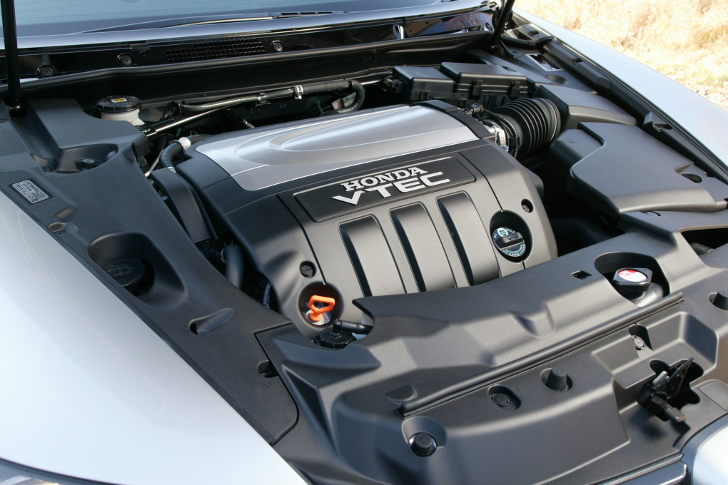 Honda J35A engine.